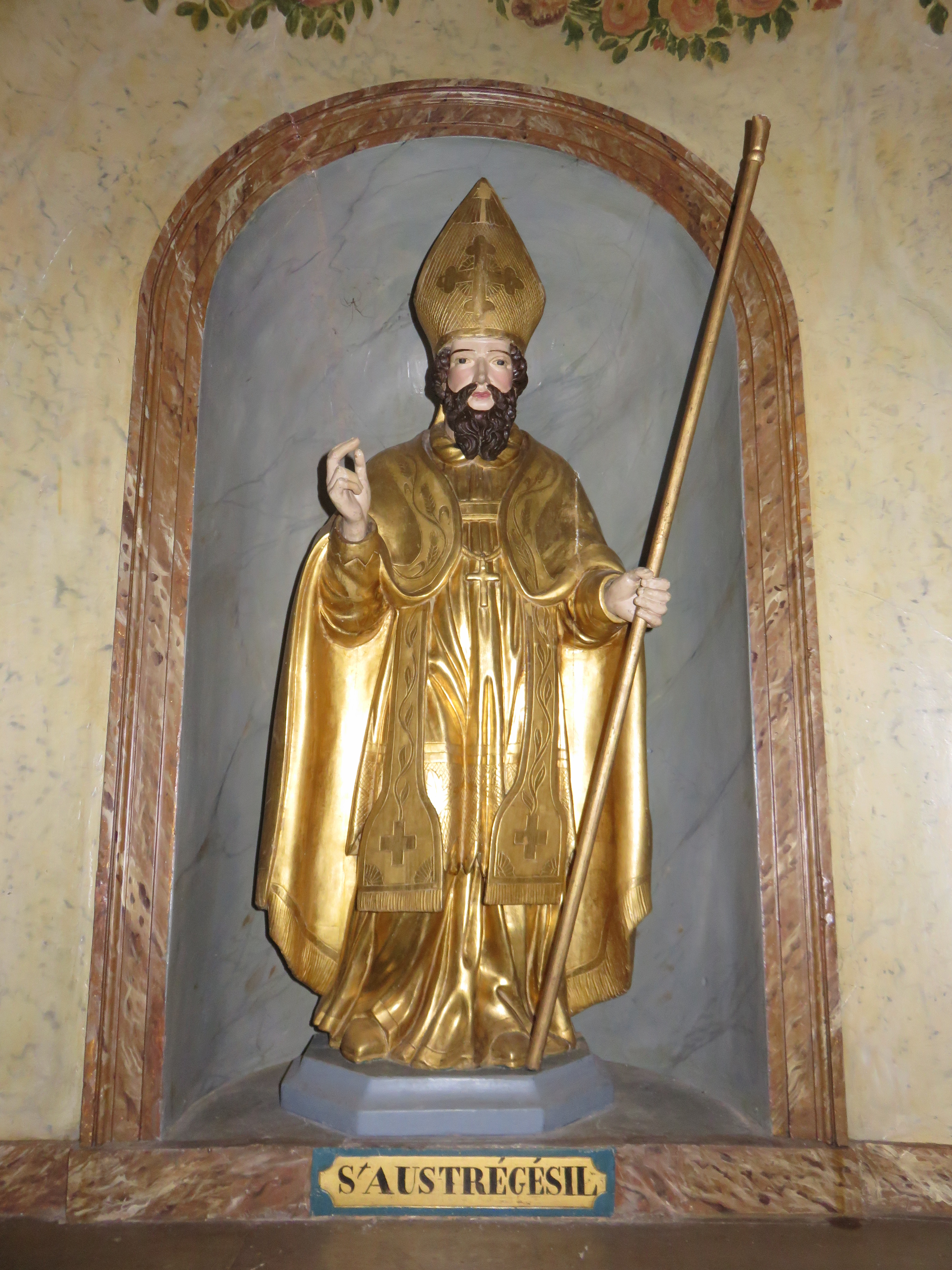 Statue de saint Austrégésile, dans l'église Saint-Dutrille de Frontenas (Rhône, France).